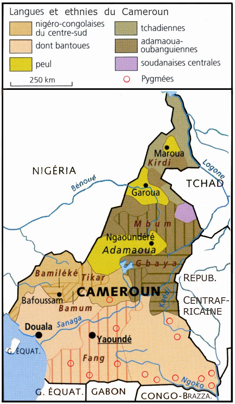 Langues et ethnies du Cameroun, d'après Anne Le Fur